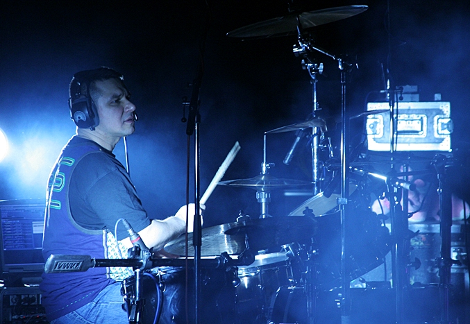 Концерт, посвященный 20-тилетию группы в ДК Ленсовета